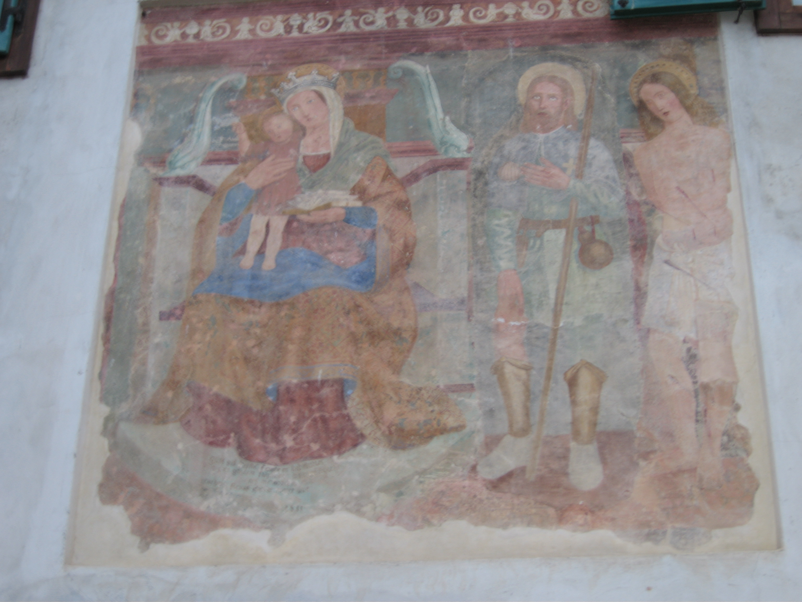 Affresco Baschenis in piazza a Monclassico (Province of Trento).